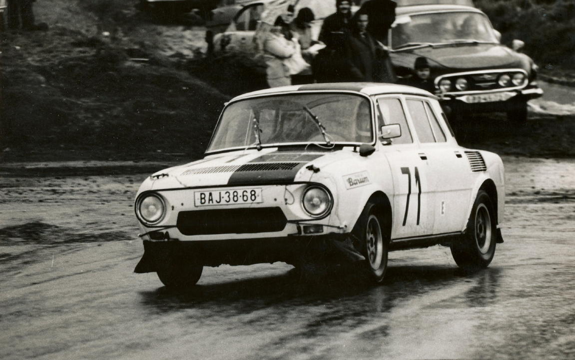 Rallye Púchov, majstrovstvo Slovenska 1978, Skoda 120 S Rallye